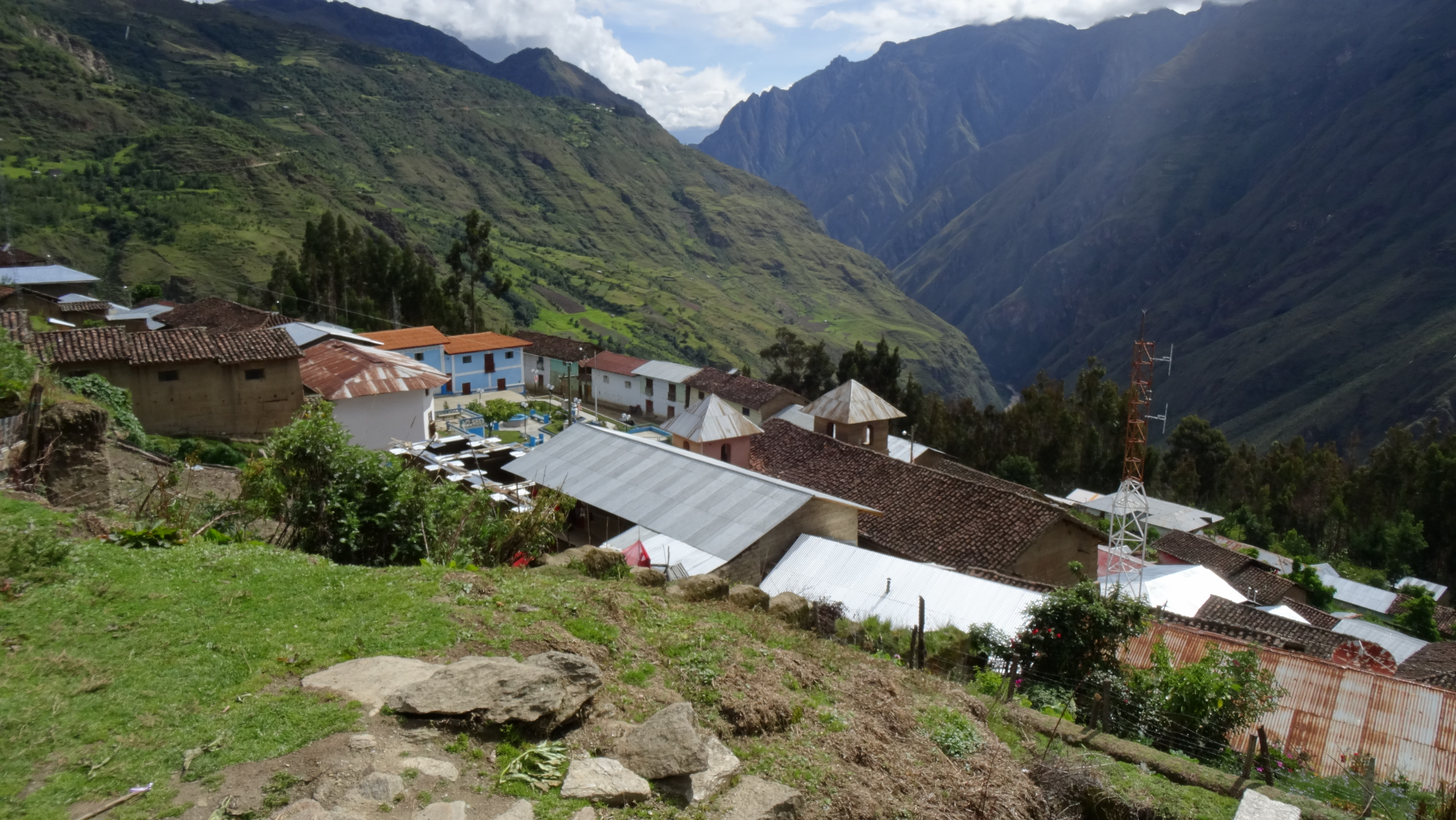 Centro Poblado de Jircán vista desde su perimetro este.